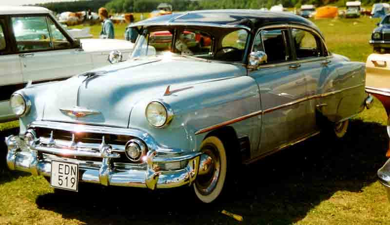 1953 Chevrolet Two-Ten Deluxe Series, Model 2103 4-Door Sedan